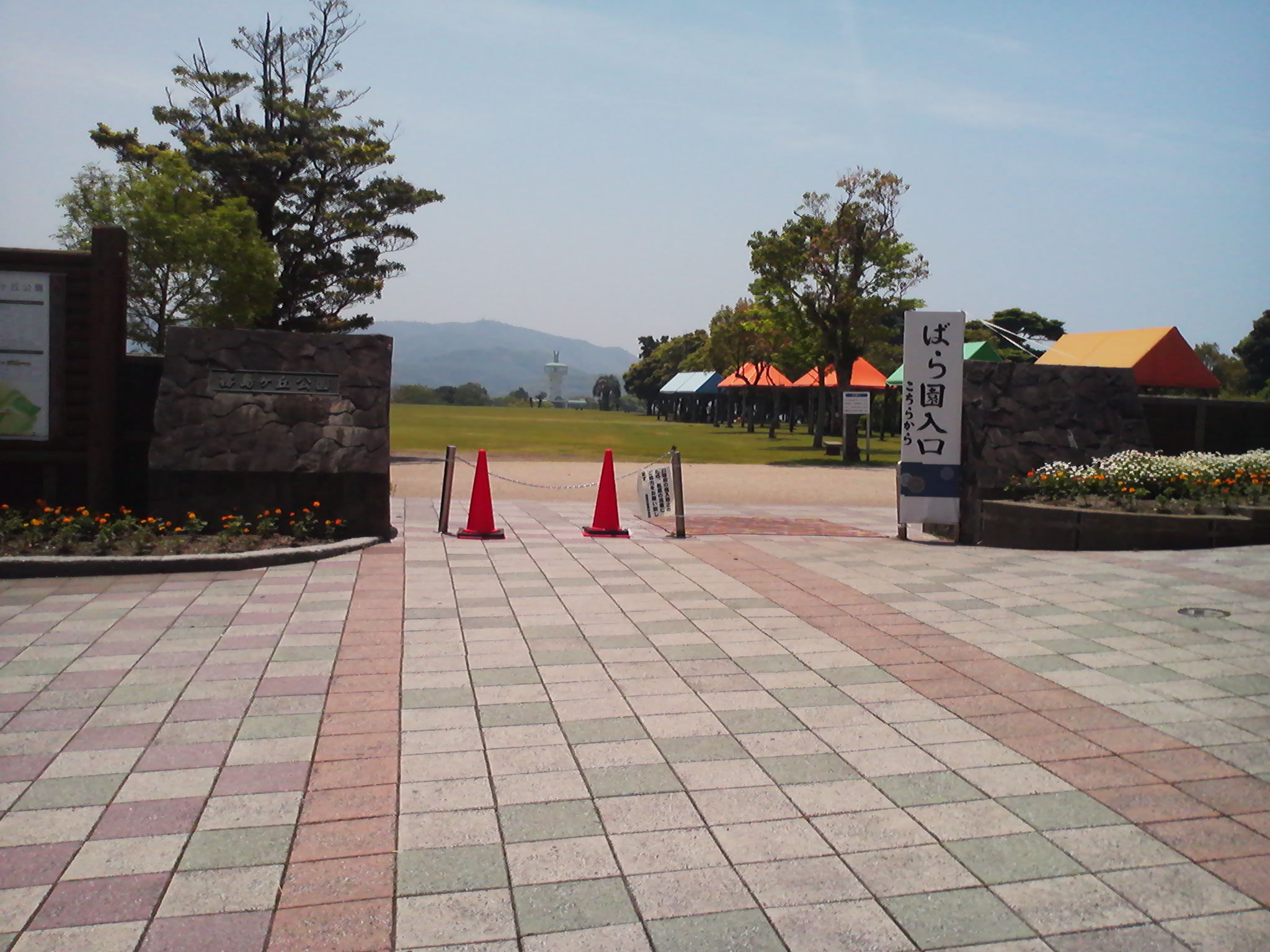 霧島ヶ丘公園の正面入り口。